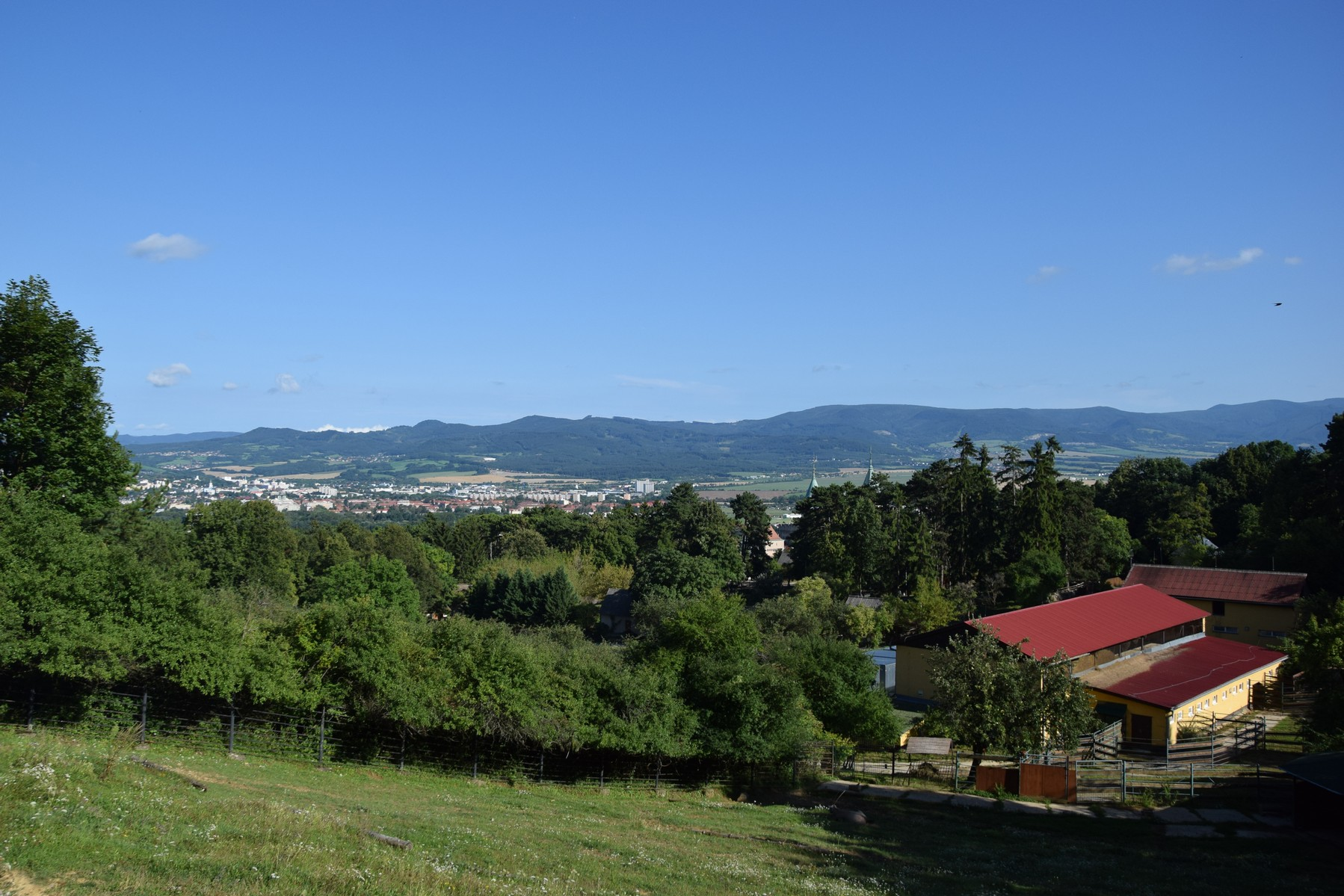 Prievidza a Vtáčnik z Bojníc